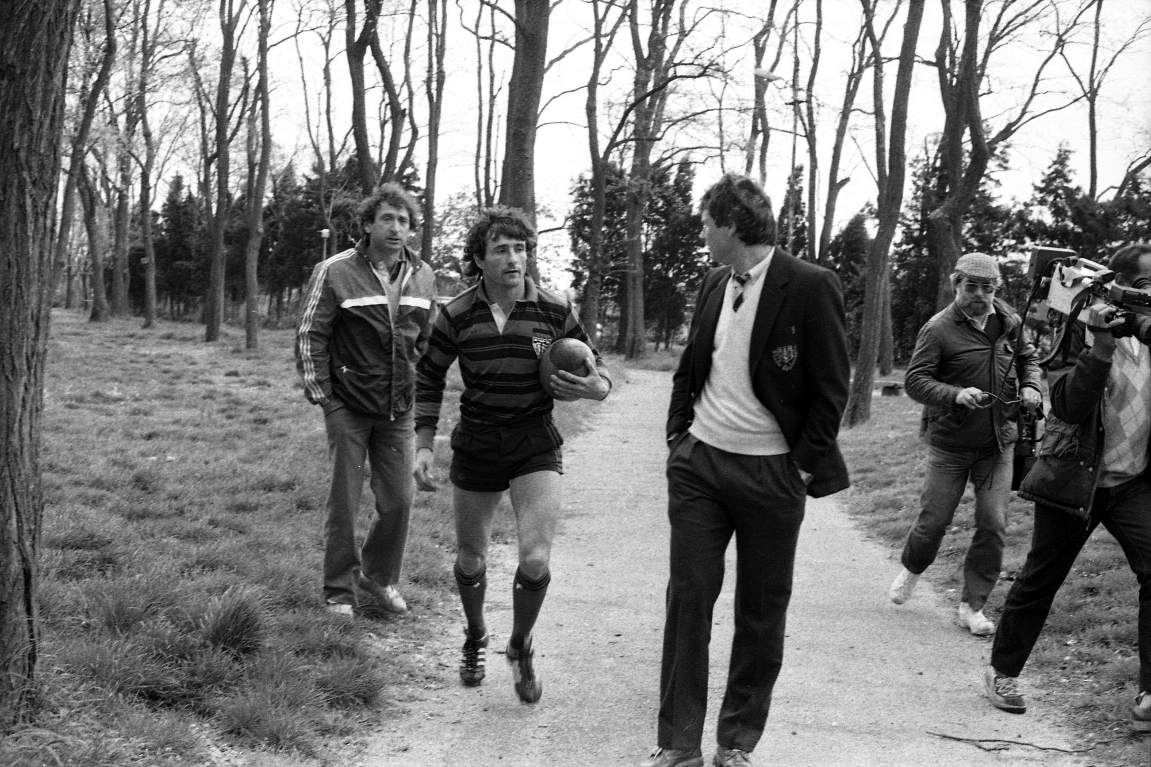 Pas de lieu. Le14 Avril 1985. Vue de Pierre Villepreux et de deux joueurs du Stade Toulousain dans un sous-bois.